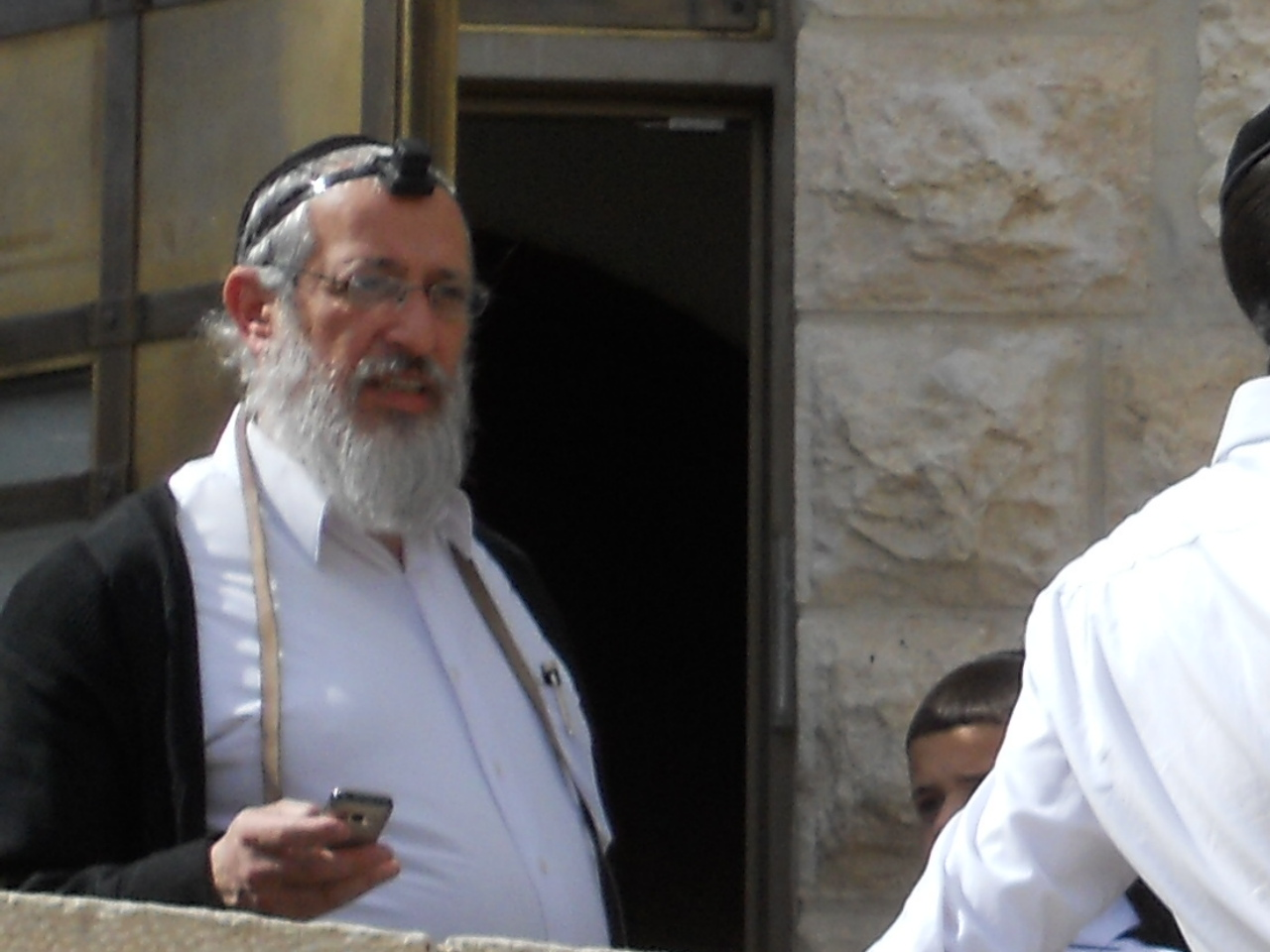 הרב יוסף זילברמן מירושלים